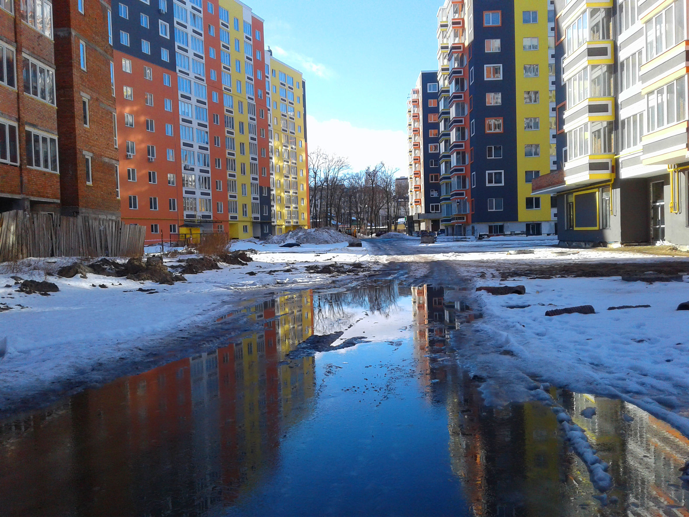 ЖК "Синергія-2". Урочище Пилипів Потік. Ірпінь, вул. Мечнікова.